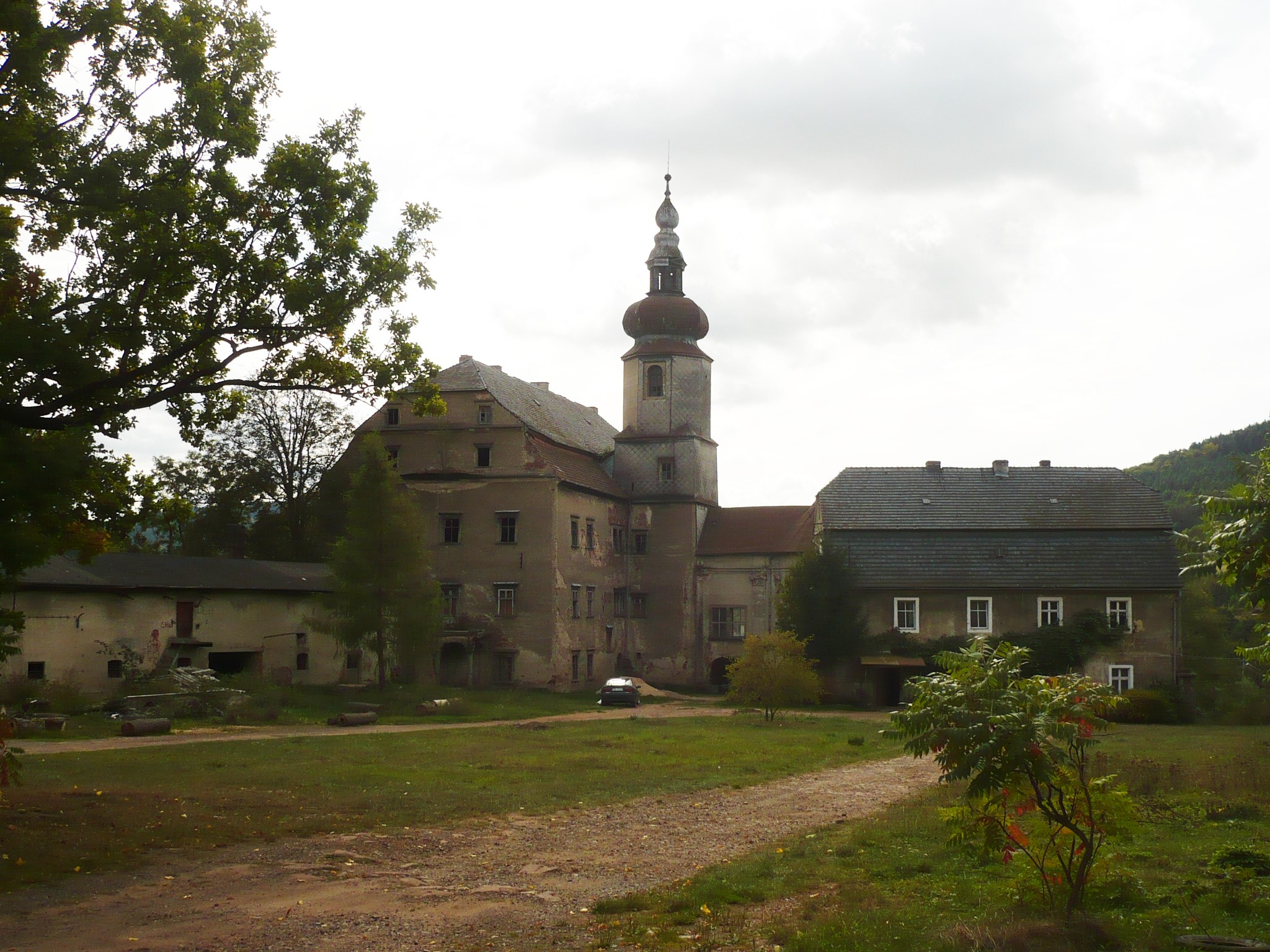 Sarny. Pałac